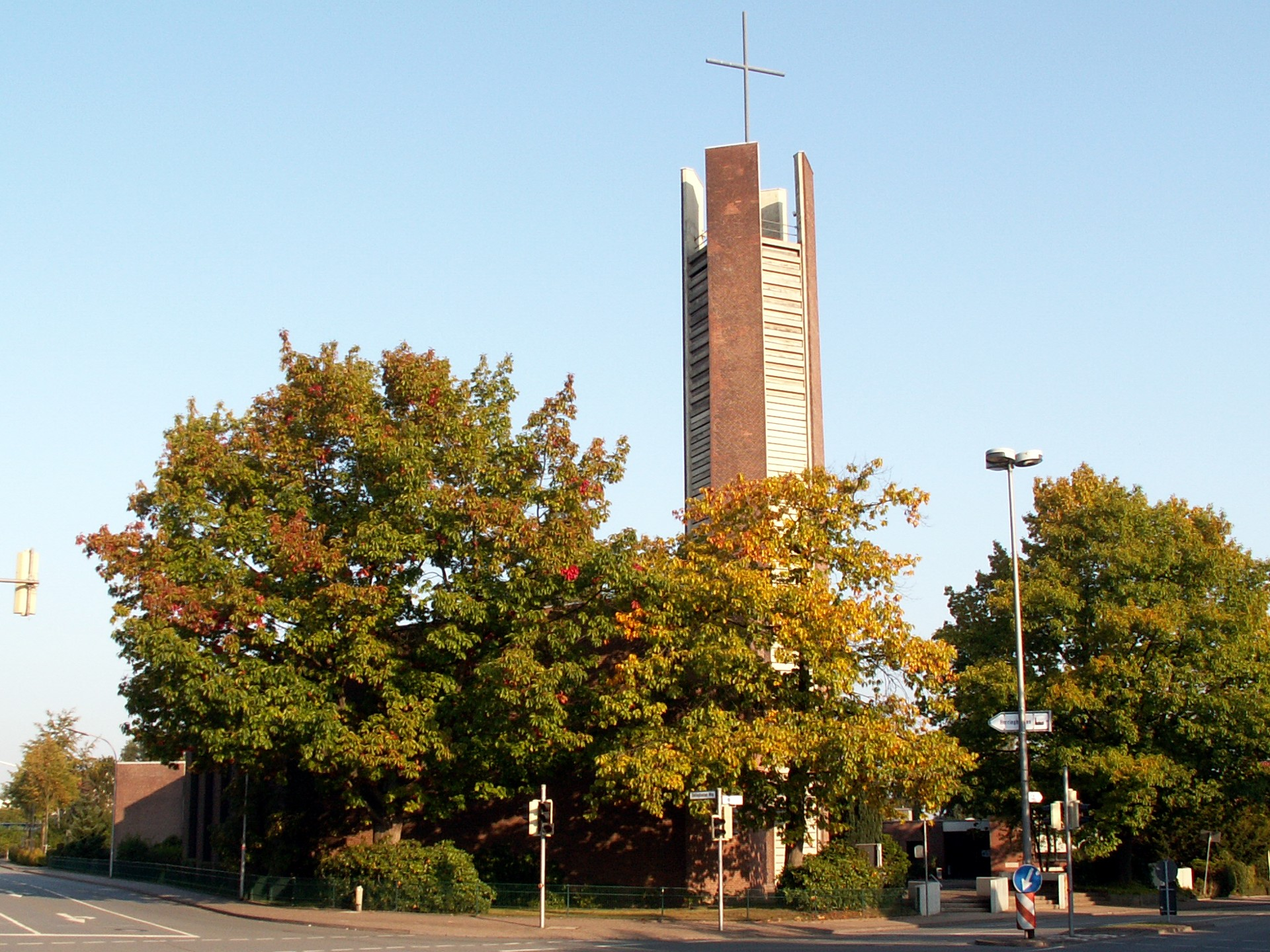 kath. Kirche St. Paulus in Herford, Ansicht von Südosten